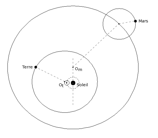 Description : Orbites de la Terre et de Mars dans le système héliocentrique de Copernic. Source : Dhenry ; schéma personnel. Licence